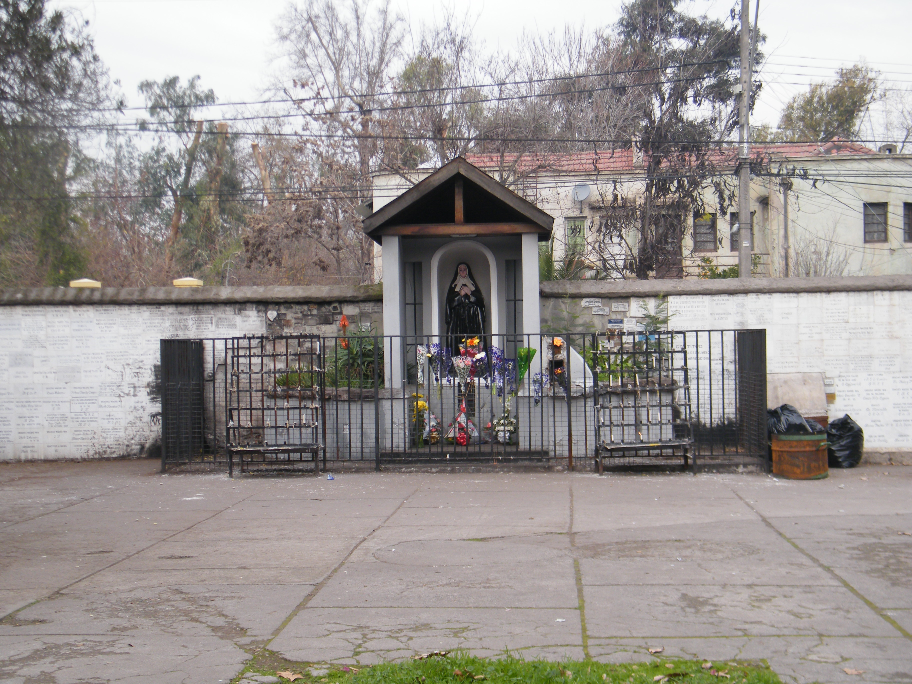 Imágenes del santuario de Lourdes (Chile), Basílica.